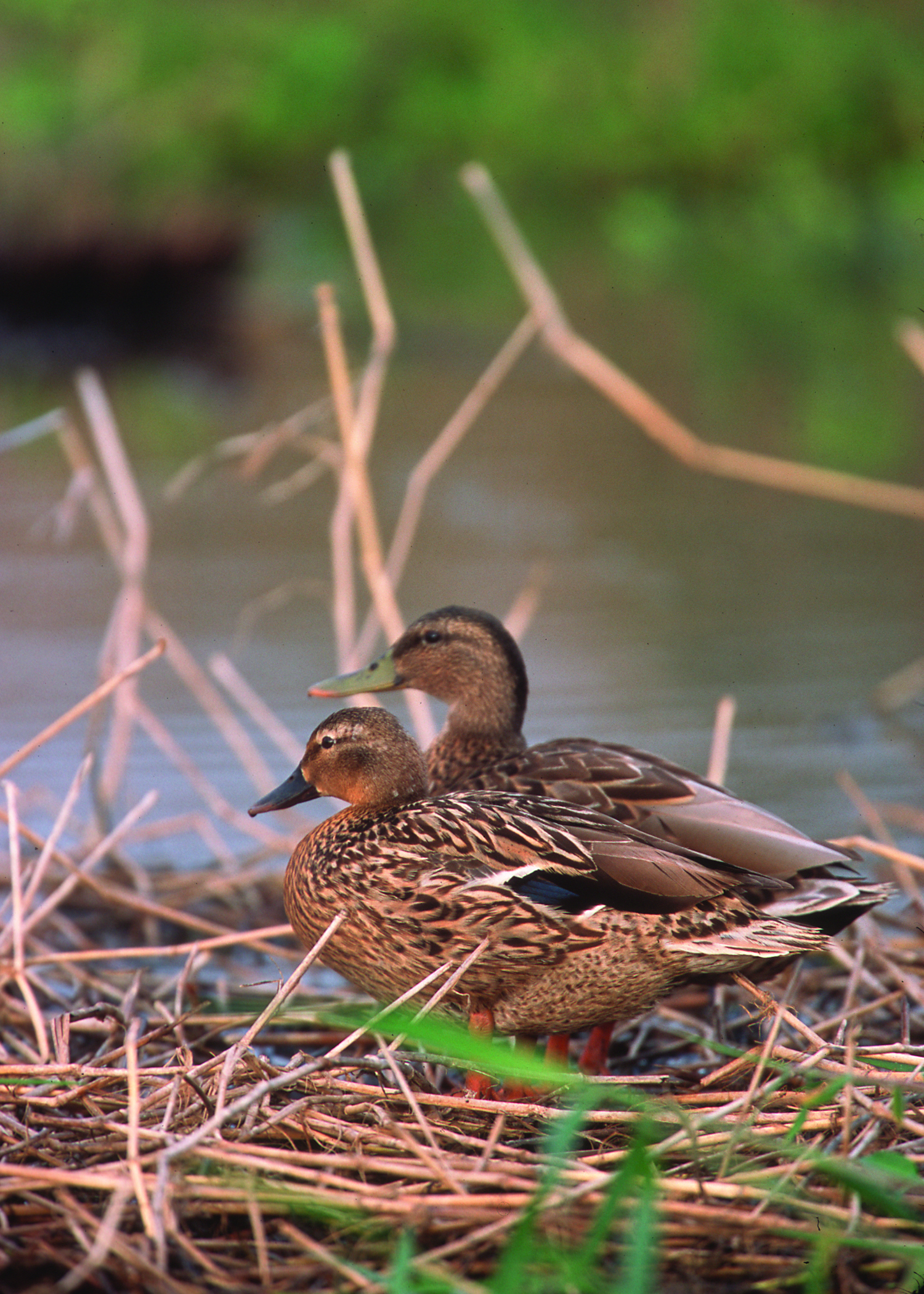 Hawaiian Duck - Koloa